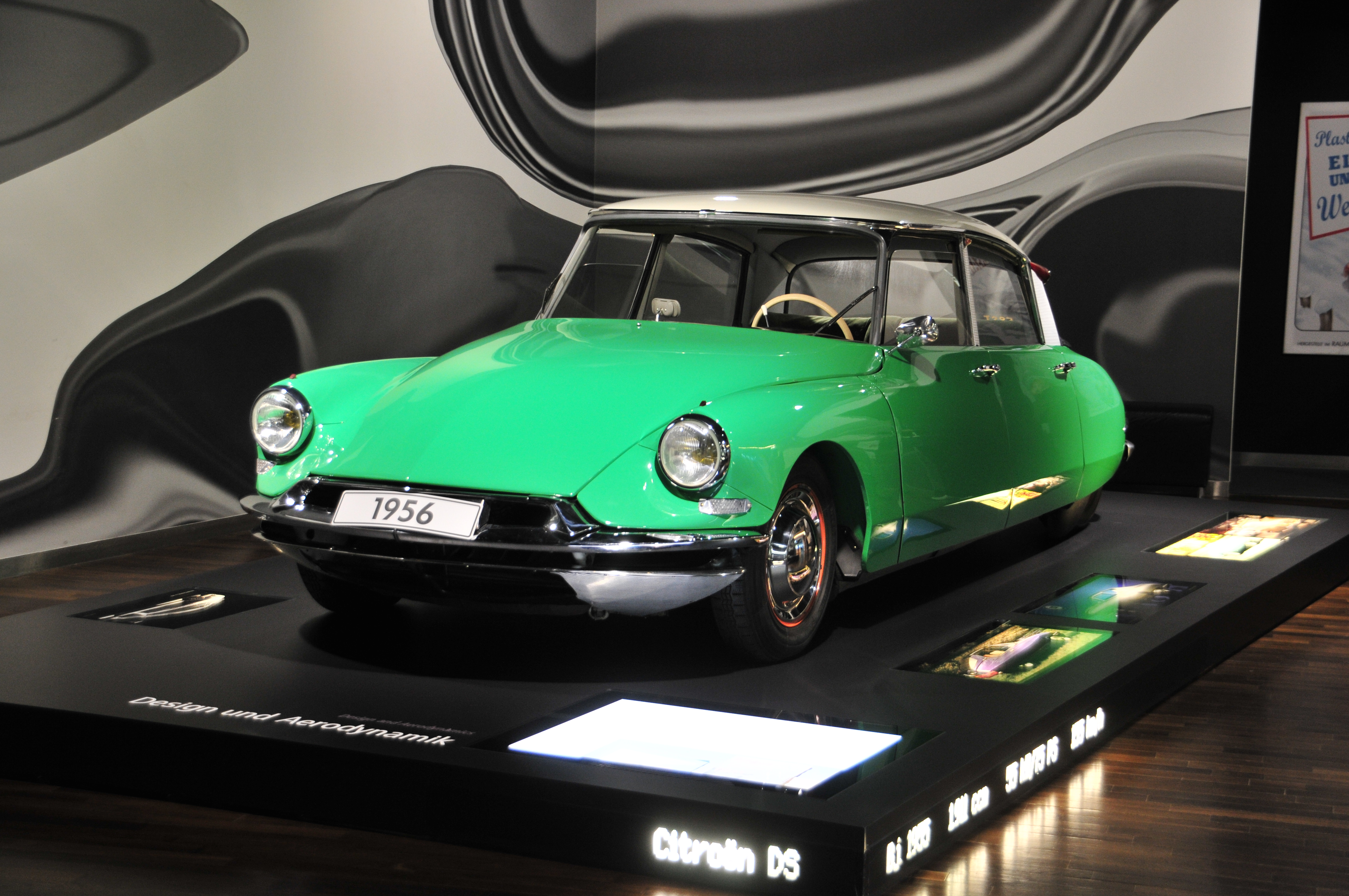 Fahrzeug in der Autostadt Wolfsburg